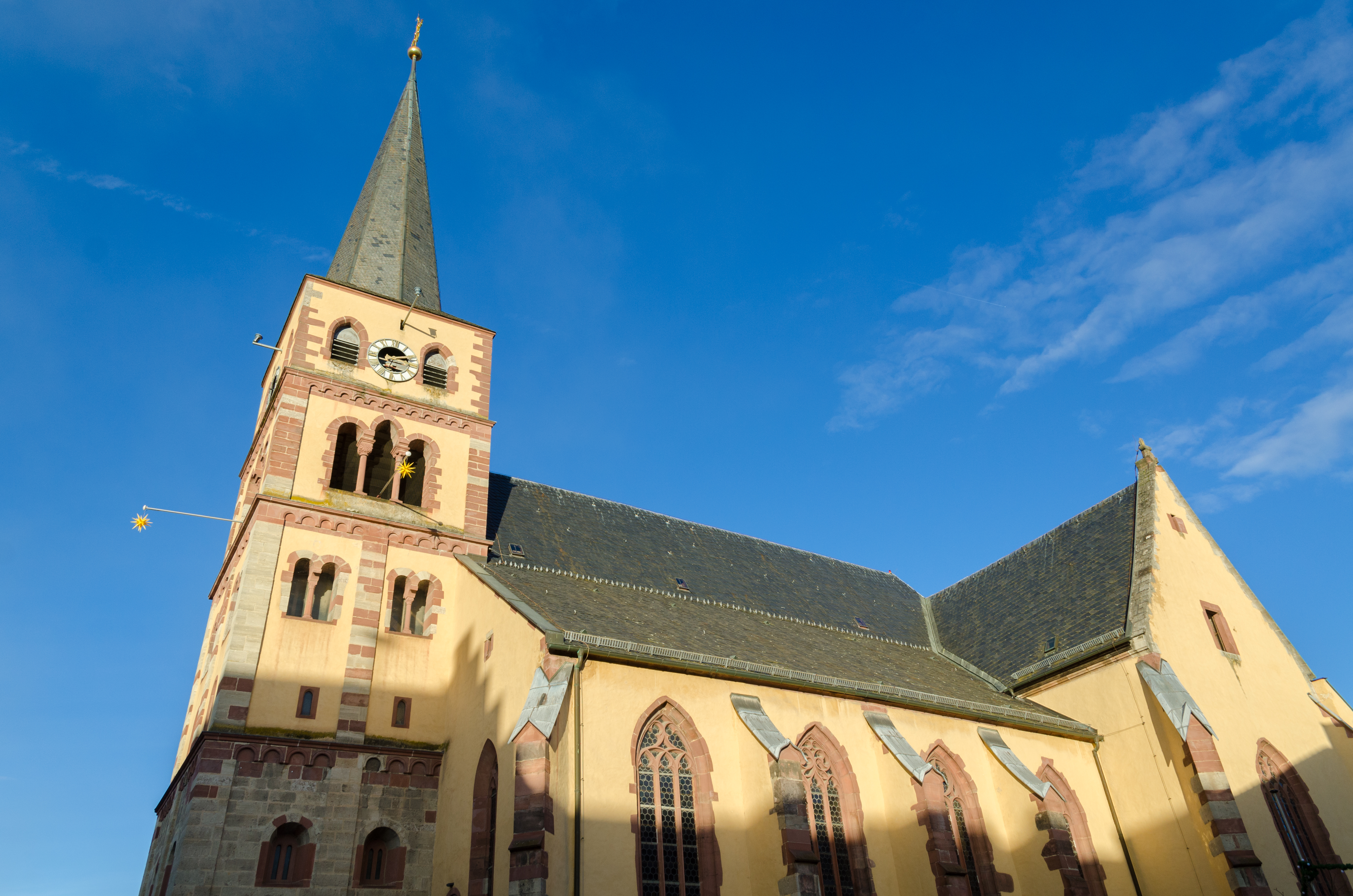 Karlstadt, Stadtpfarrkirche St. Andreas, Exterior